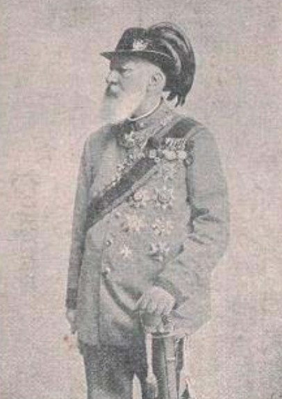 Bruno zu Ysenburg und Büdingen (1837-1906), 3. Fürst zu Ysingen-Büdingen (postcard)